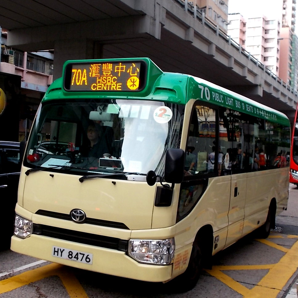 九龍專線小巴70A線，駛經太子道西前往大角咀